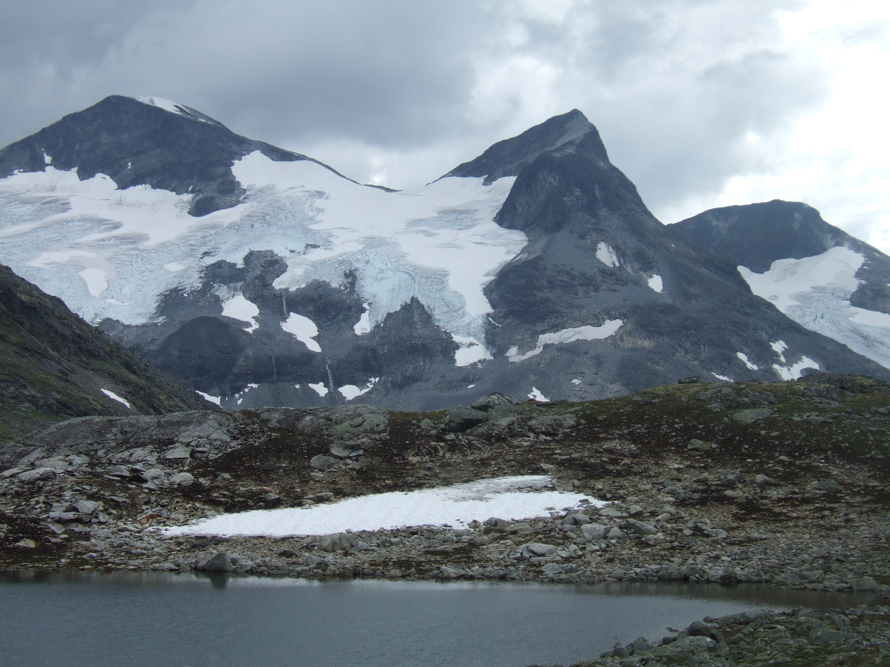 Del av fjellkjeden Rauddalstindane i Luster kommune i Sogn og Fjordane. Den høyeste toppen er Store Rauddalstind på 2157 meter over havet. Dette er det 82. høyeste fjellet i landet.